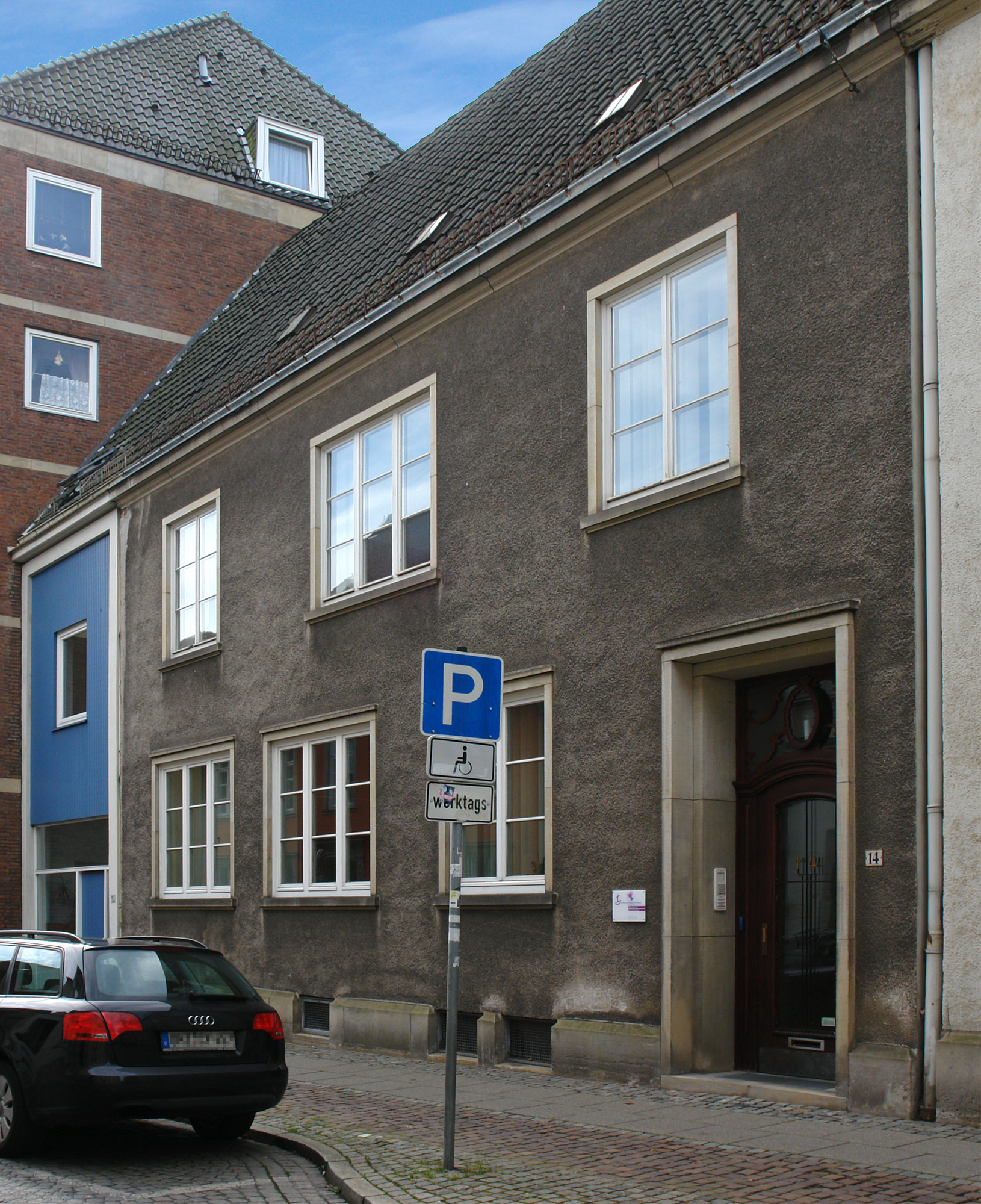 Predigerhaus der Domgemeinde in Bremen, Sandstraße 14.Das abgebildete Objekt ist ein geschütztes Kulturdenkmal in der Freien Hansestadt Bremen, mit der Nr. 0182 beim Landesamt für Denkmalpflege registriert.